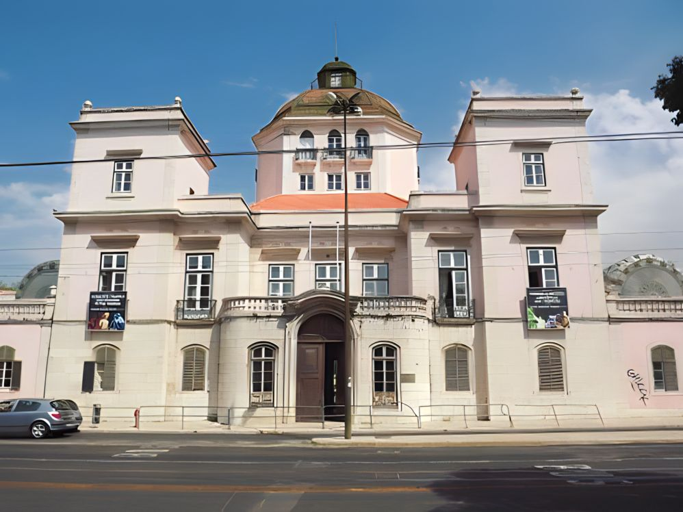 Palácio Burnay na Rua Junqueira, Freguesia de Alcântara, Concelho de Lisboa